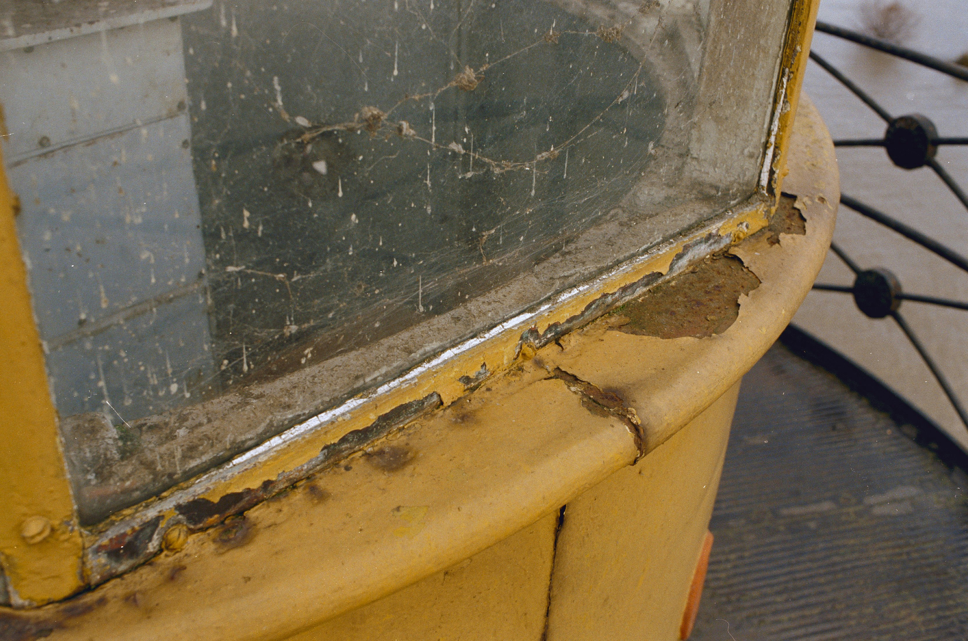 Lichtopstand: Detail: buitenkant lantaarnhuis, geroest staal met gele verf